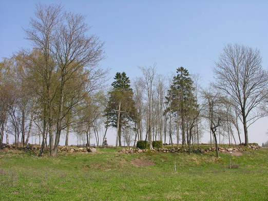 Buknaičių kaimo kapinaitės, Mažeikių raj., Reivyčių sen. Foto: Algirdas, 2006 m. gegužės 4 d.